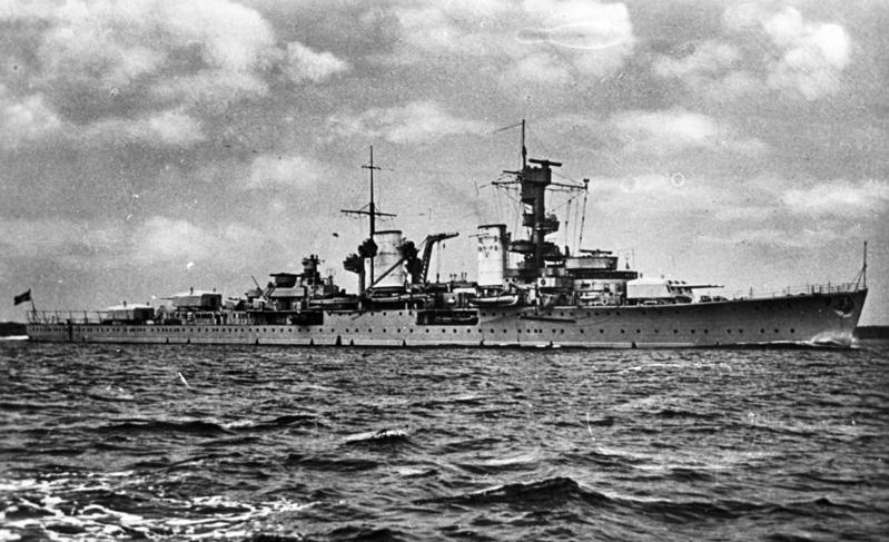 Leichter Kreuzer der "K-Klasse" Leichter Kreuzer der Königsberg-Klasse (Leichter Kreuzer Karlsruhe / Leichter Kreuzer Köln / Leichter Kreuzer Königsberg)